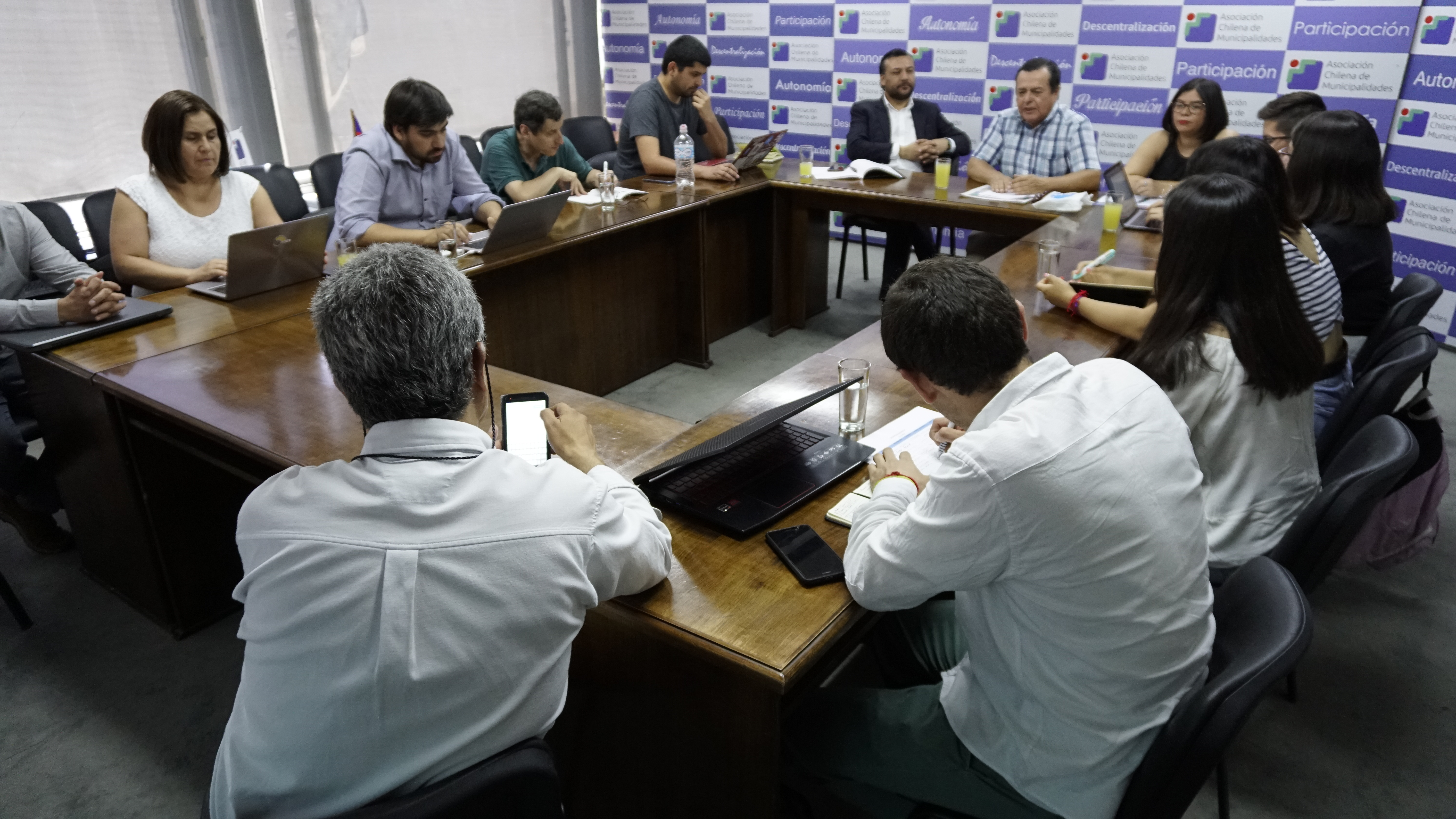 Reunión de trabajo en la Asociación Chilena de Municipalidades definiendo mecanismos de difusión de la Consulta Ciudadana de Chile de 2019